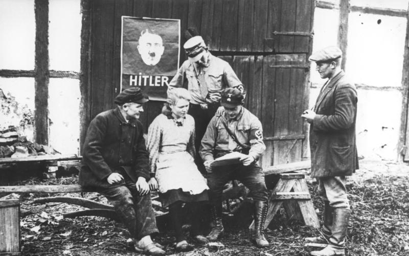 Sommer 1932 im Mecklenburgerland. Hitlers getreue S.A. lässt es sich nicht nehmen, zu den bevorstehenden Reichstagswahlen alle Kräfte für den Wahlfang einzuspannen und auch den kleinsten Bauernhof für den Stimmenfang reif zu machen.